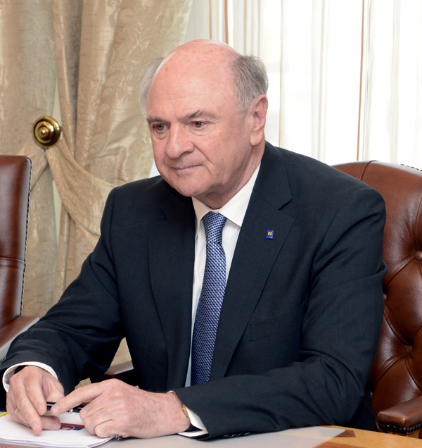 Erwin Pröll